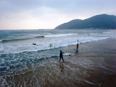 サーフィンスポットとして有名。